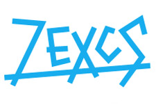 Descripción del estudio ZEXCS